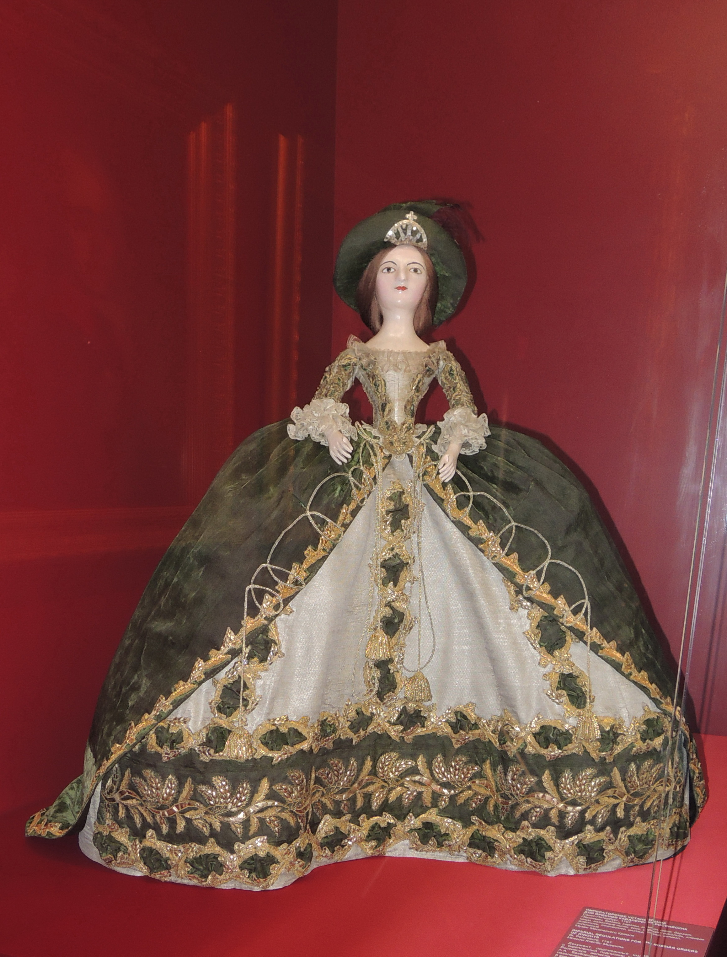 Кукла в платье ордена святой Екатерины. Западная Европа, 1798. Дерево, краска, глазет, бархат, кружево, тафта, кисея, перья, золотные нити, блестки, тесьма, шнур, кисти, трунцал, плащики, фольга; ткачество, шитье, аппликации. ММК. Модельная кукла служила образцом при создании церемониальных платьев для кавалерственных дам Большого креста ордена Святой Екатерины. Согласно Установлению для орденов кавалерских российских, обнародованному императором Павлом I непосредственно во время коронации в Успенском соборе, орден Святой Екатерины был причислен ко второму классу "вообще российского кавалерского ордена", а орденские костюмы, предназначенные для присутствия на официальных церемониях орденских праздников, были значительно модифицированы, в частности - разработано два варианта их декорировки - для дам Большого и Малого креста.